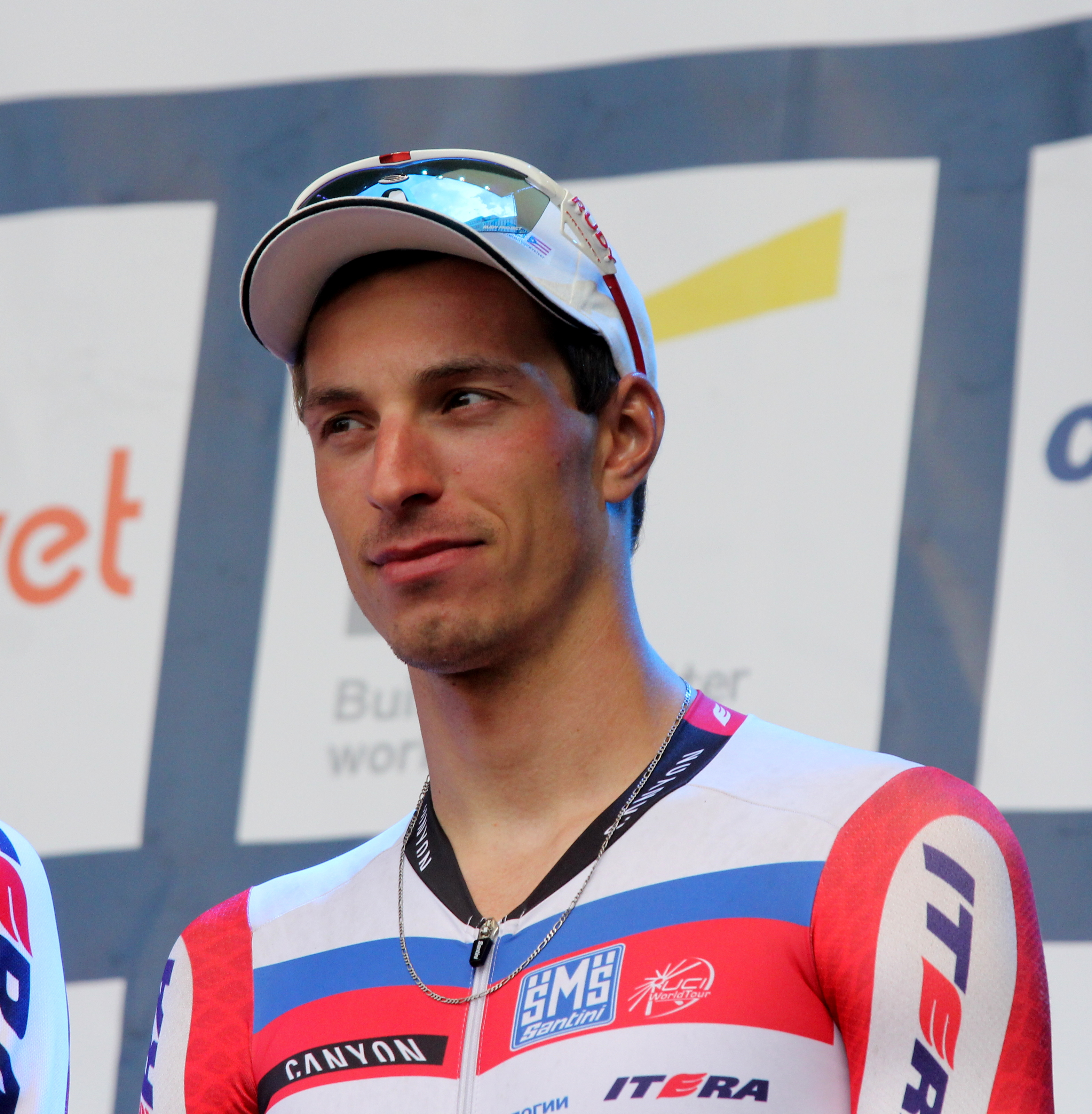 Rüdiger Selig under Tour des Fjords 2013